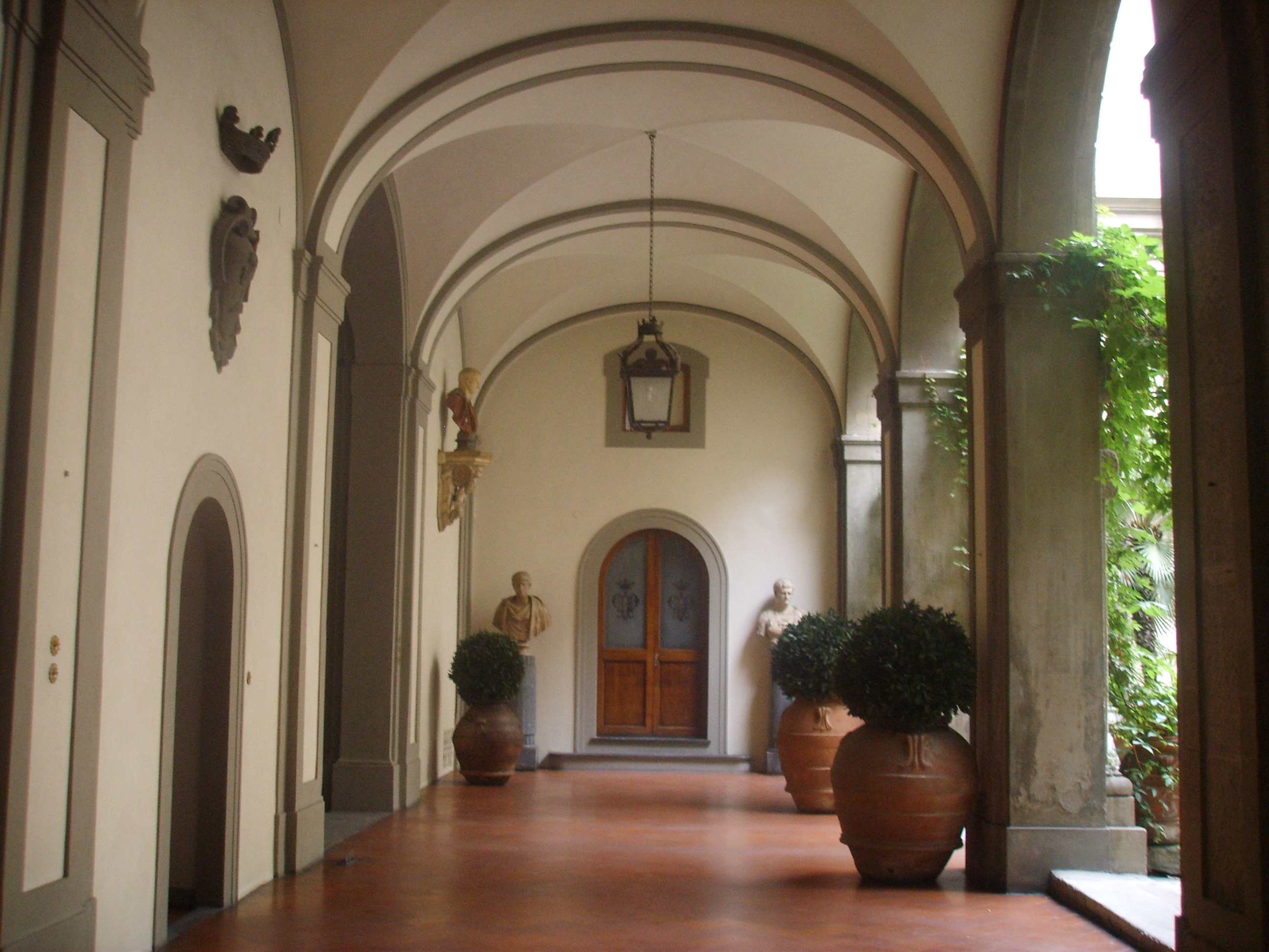 Palazzo Pucci in Florence, Italy